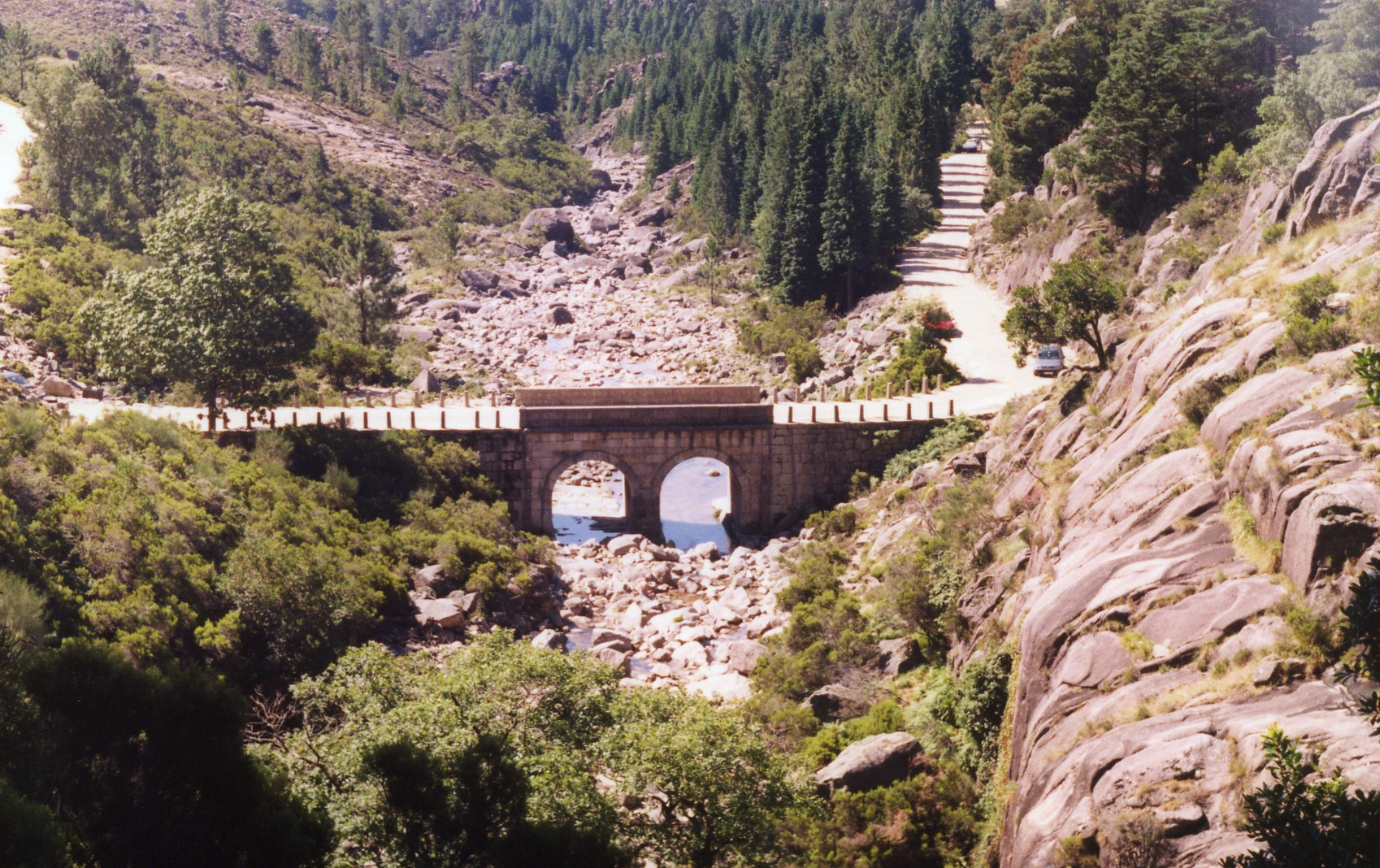 Ponte sobre o Rio Arado - Parque Nacional da Peneda-Gerês